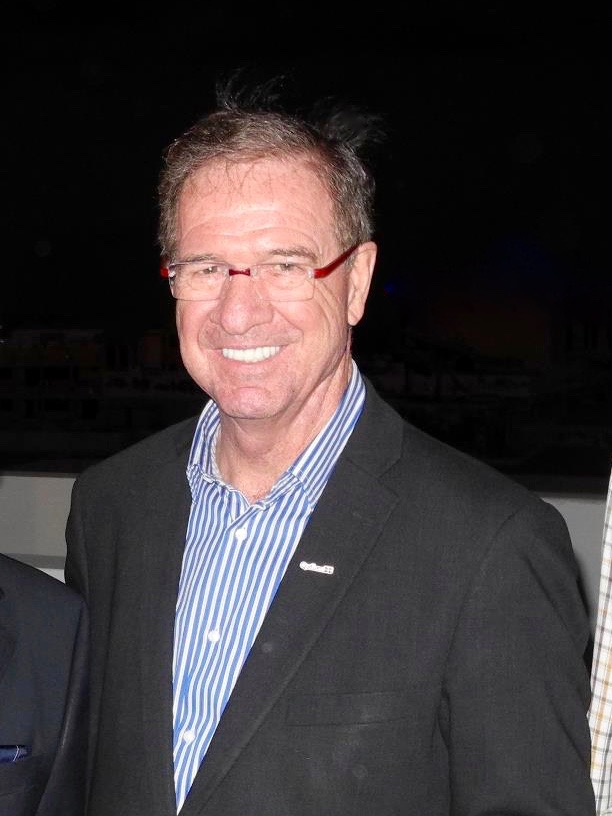 Rémy Trudel, au cocktail d'ouverture du IVe symposium international de la COLUFRAS